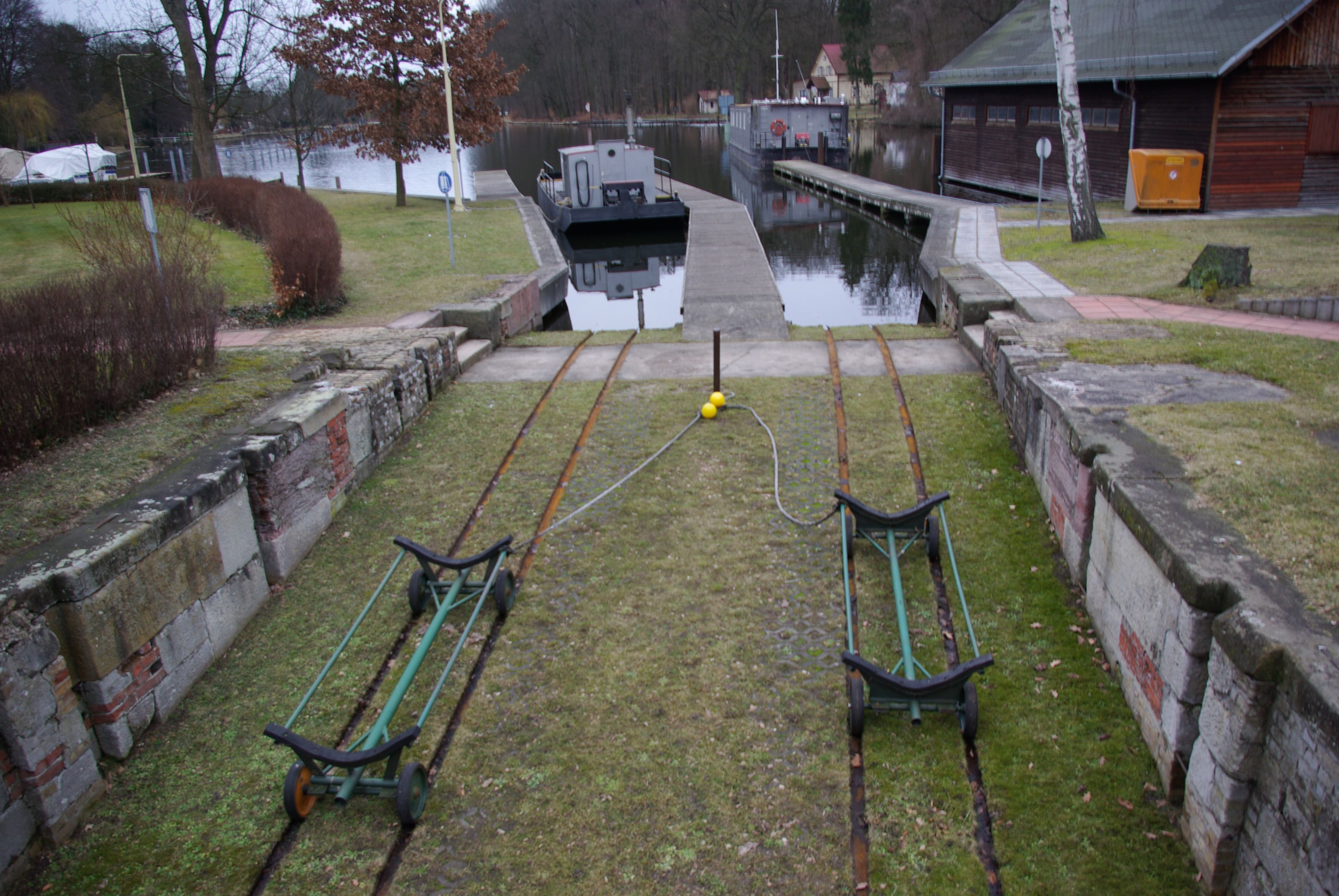 Königs Wusterhausen in Brandenburg. Die Schleuse im Ortsteil Neue Schleuse steht unter Denkmalschutz. Zu sehen ist der Schiffstransport direkt neben der Schleuse.